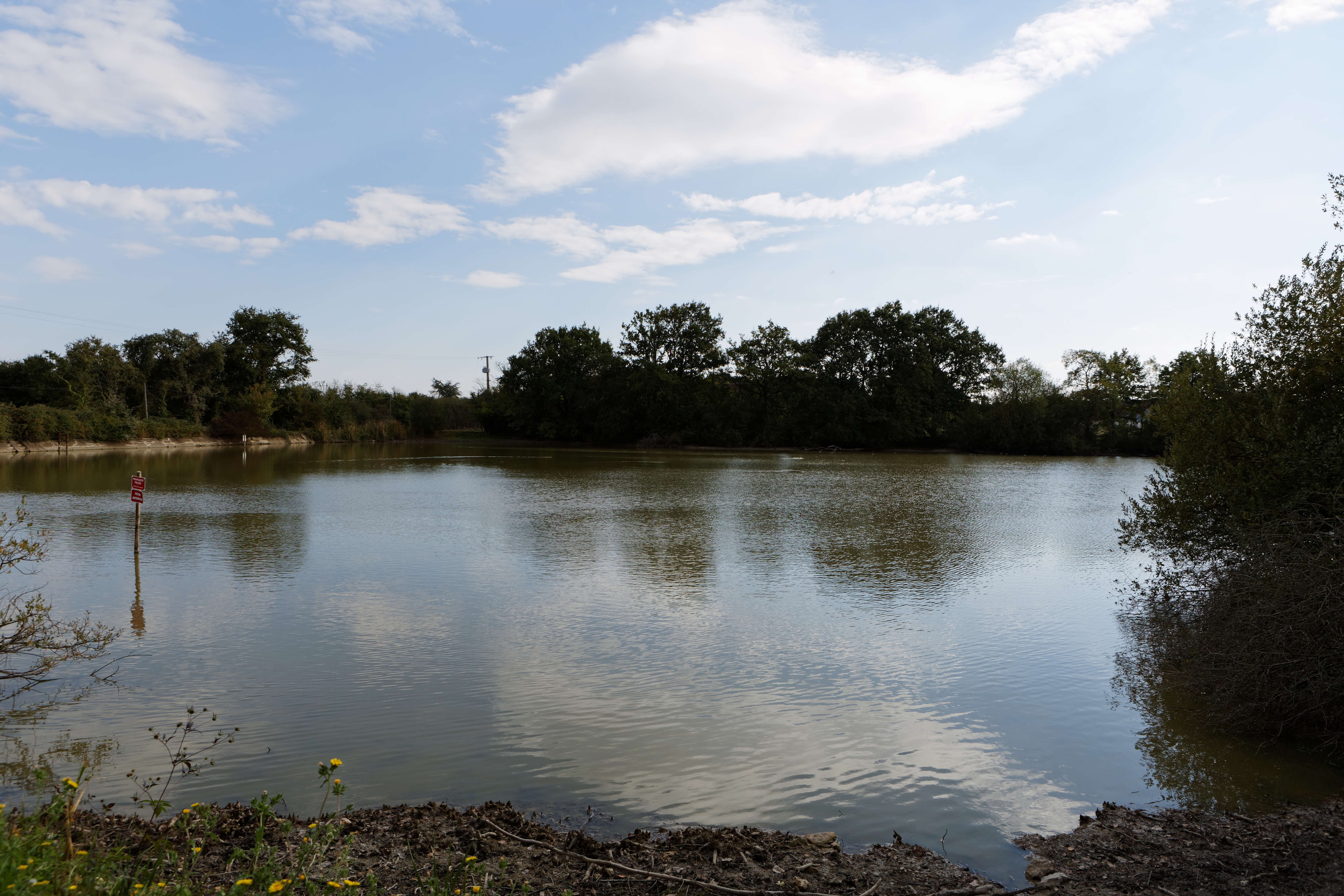 Petit étang, Montreuil-en-Touraine durant l'Opération Libre.